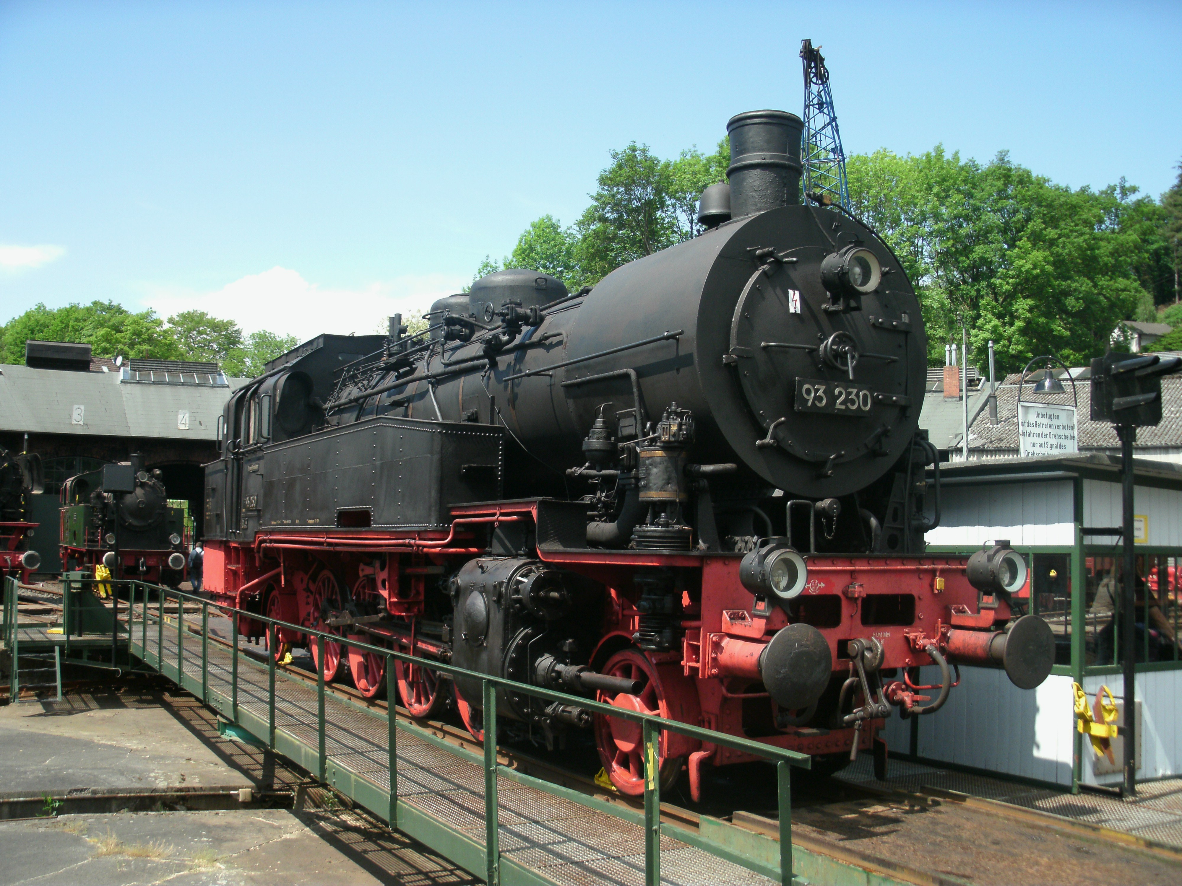 Dampflok 93 230 "der Bulle", Preußische T 14, Dauerleihgabe des Verkehrsmuseums Dresden, auf der Drehscheibe des Eisenbahnmuseums Dieringhausen